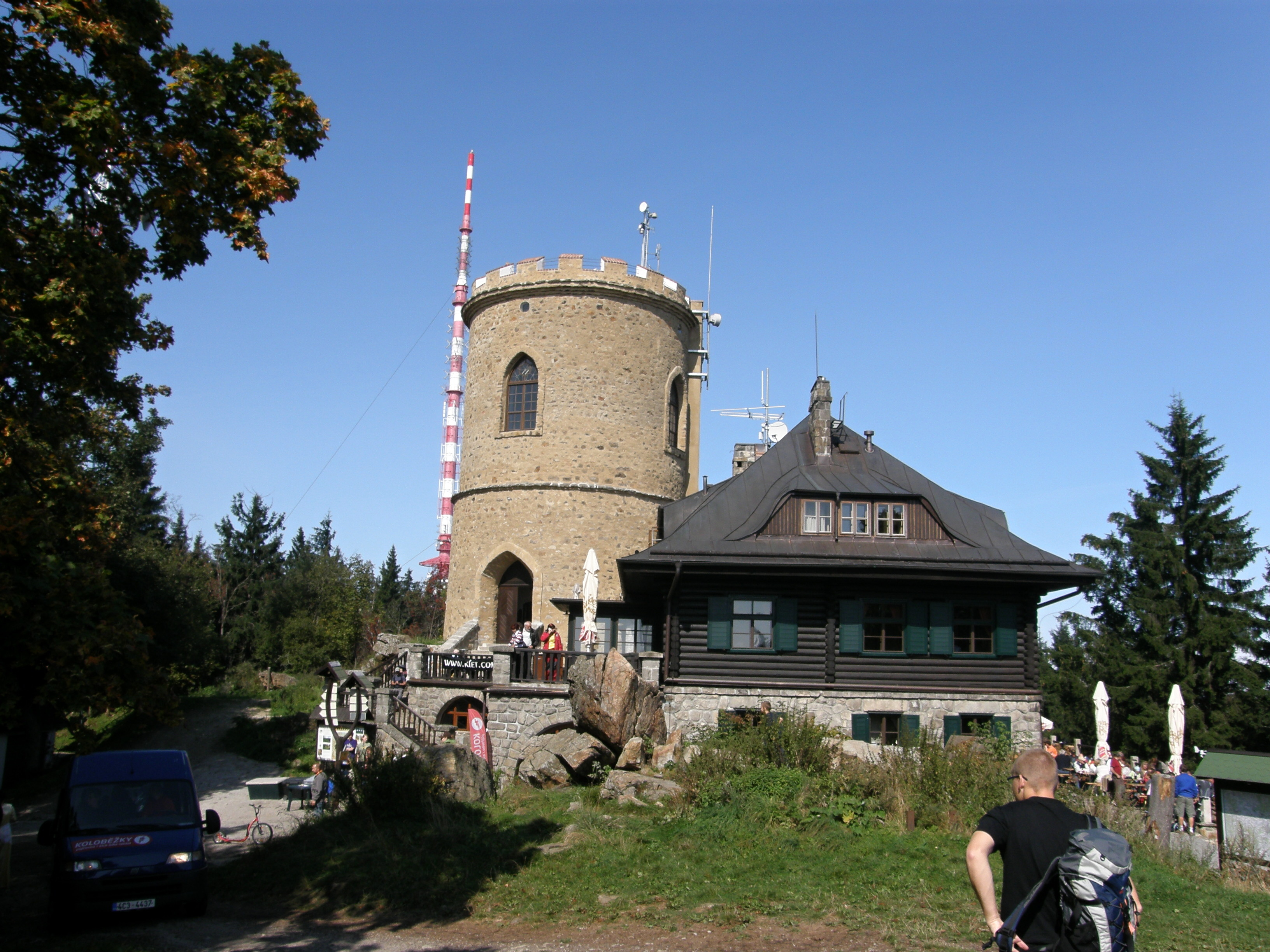 Rozhledna a chata na Kleti (Loučej), Loučej 1043